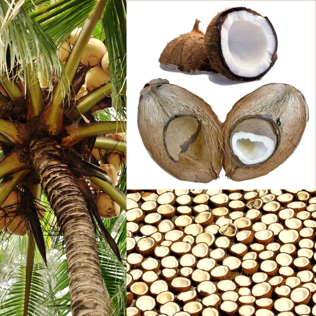 Grafika podręcznika Wikijunior:Owoce. Orzech kokosowy, owoc kokosu właściwego (Cocos nucifera).